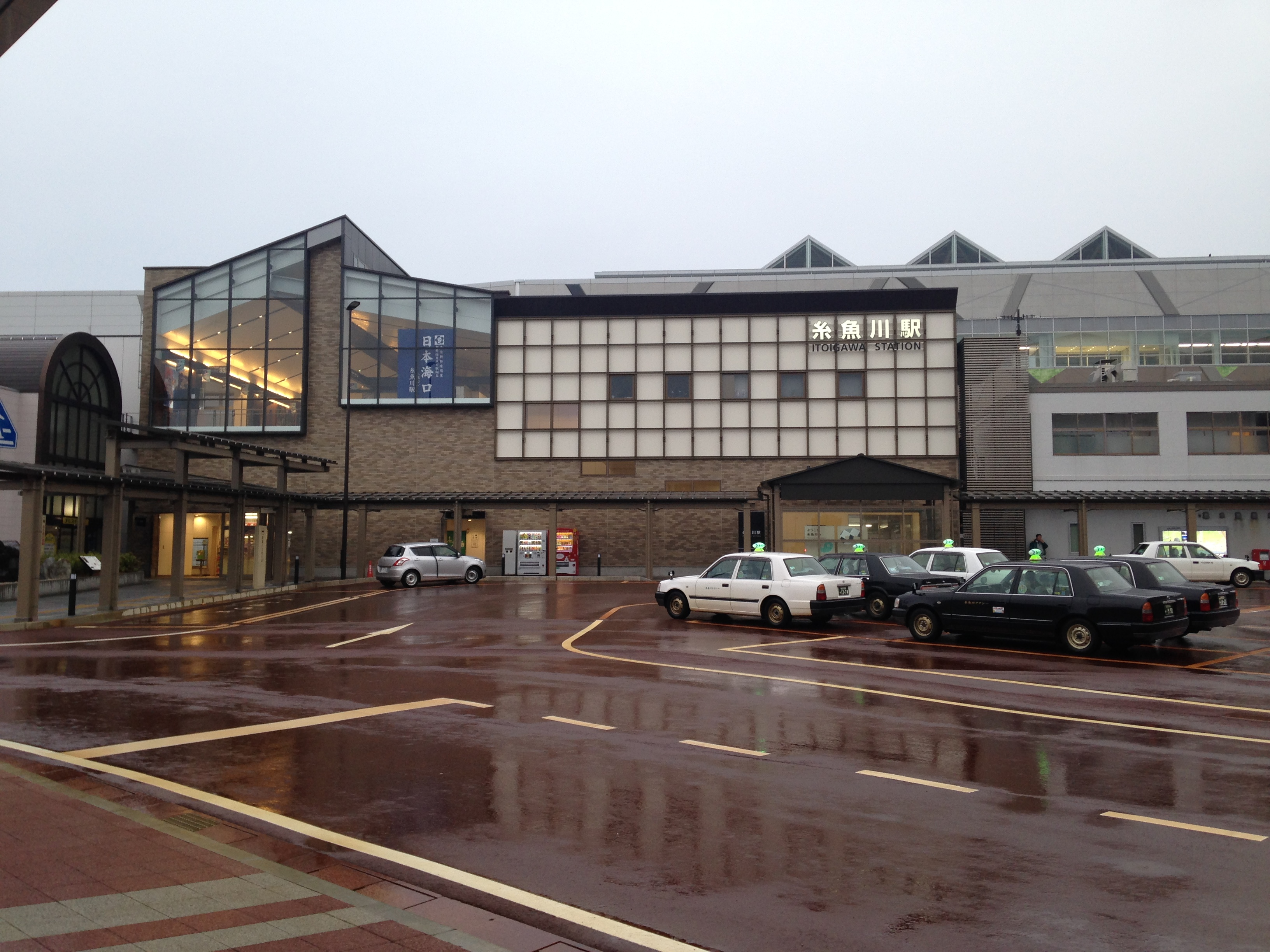 糸魚川駅(日本海口)